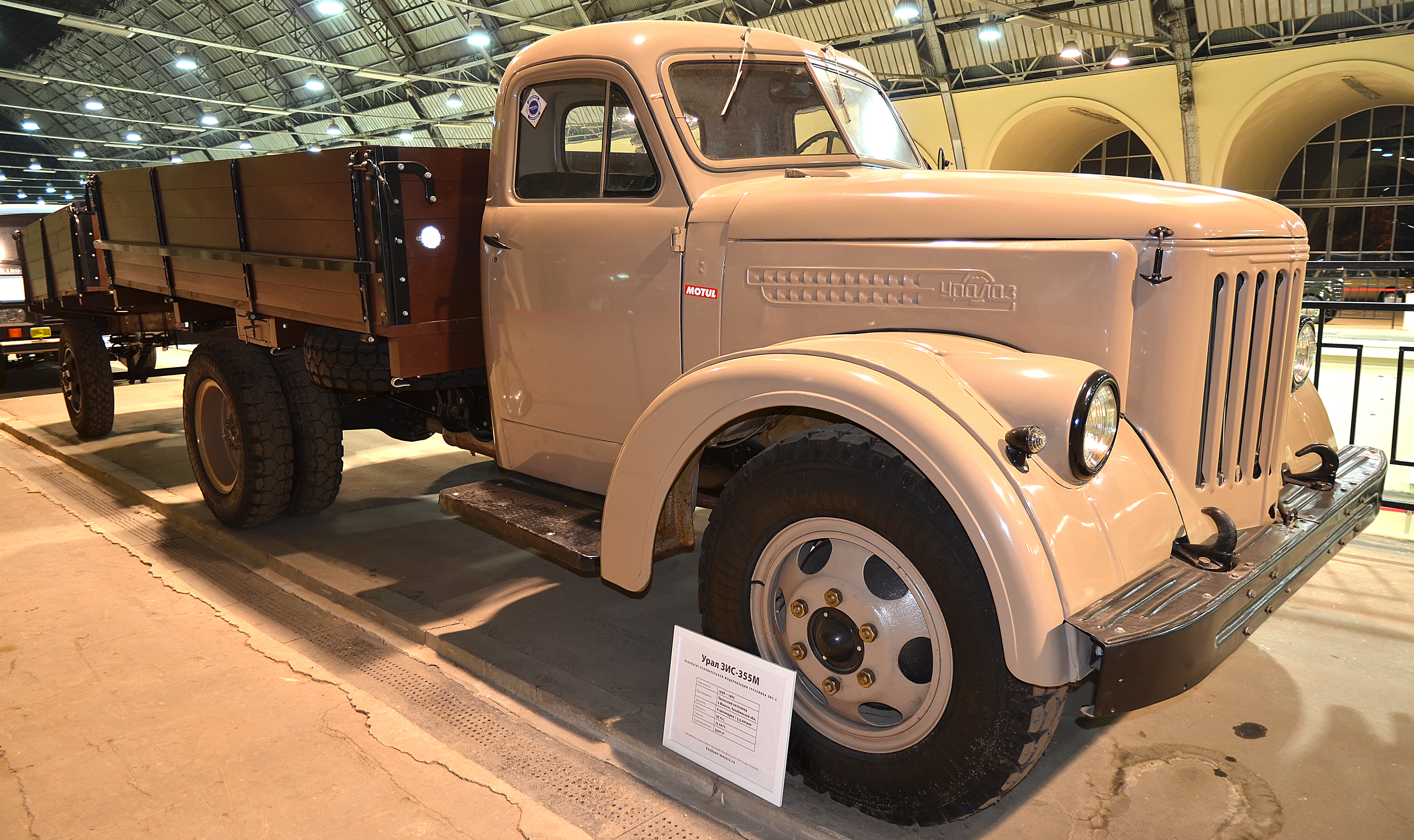 Можно увидеть здесь : You can see here